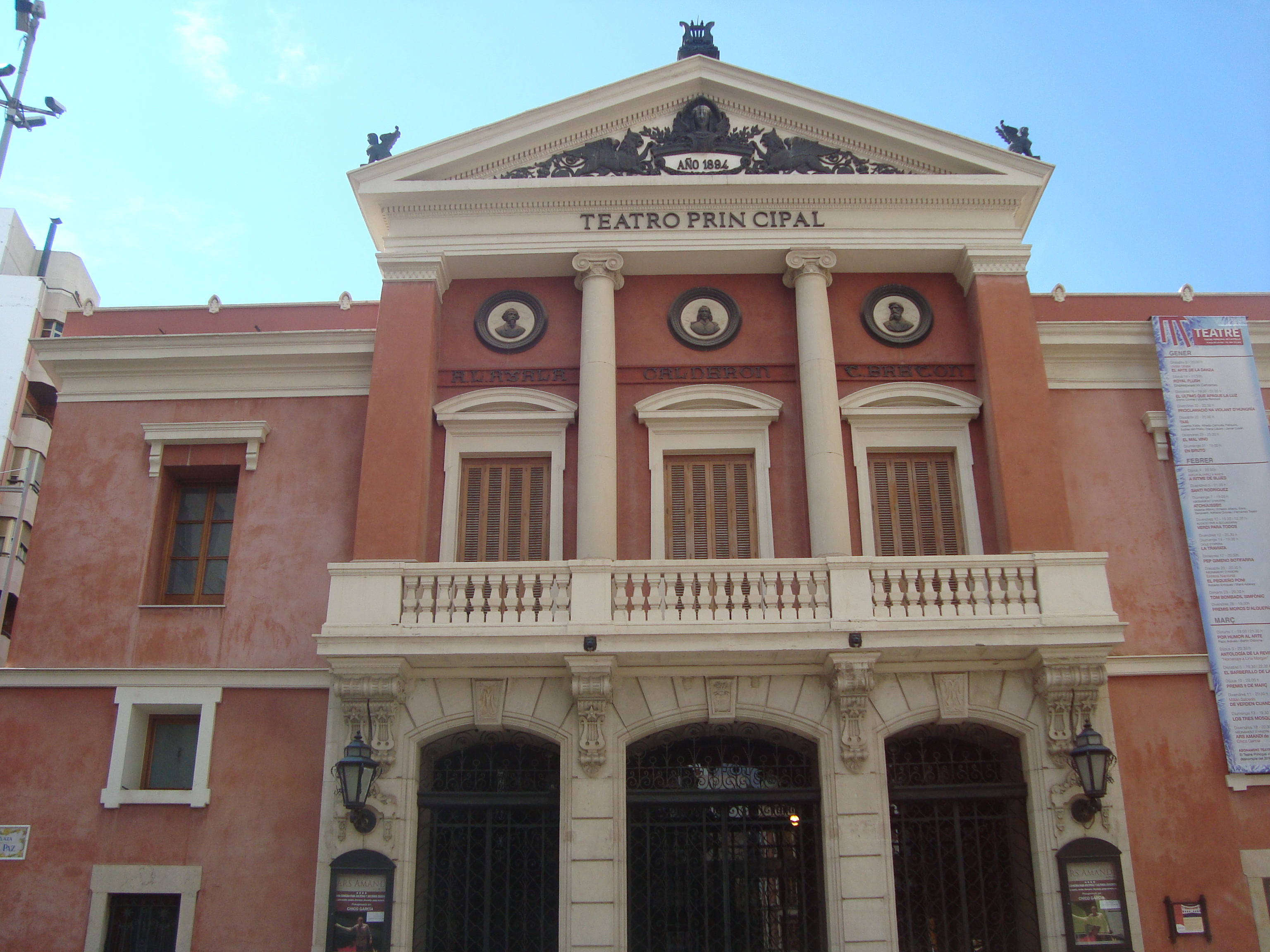 Teatre Principal (Castelló de la Plana)